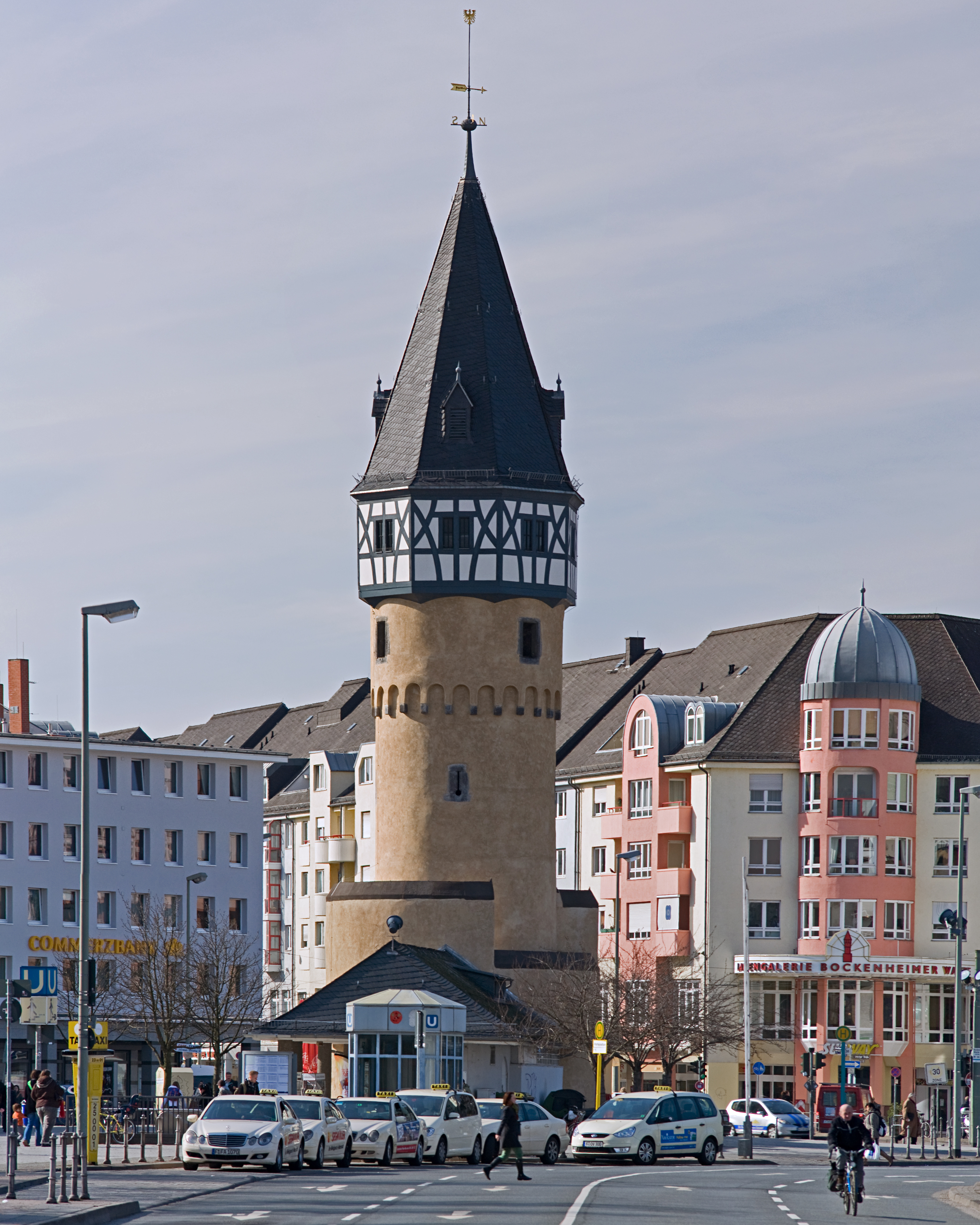 Bockenheimer Warte, Blick von der Zeppelinallee/Senckenberganlage